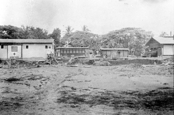 Repronegatief. Het station te Blitar na de eruptie van de Keloed